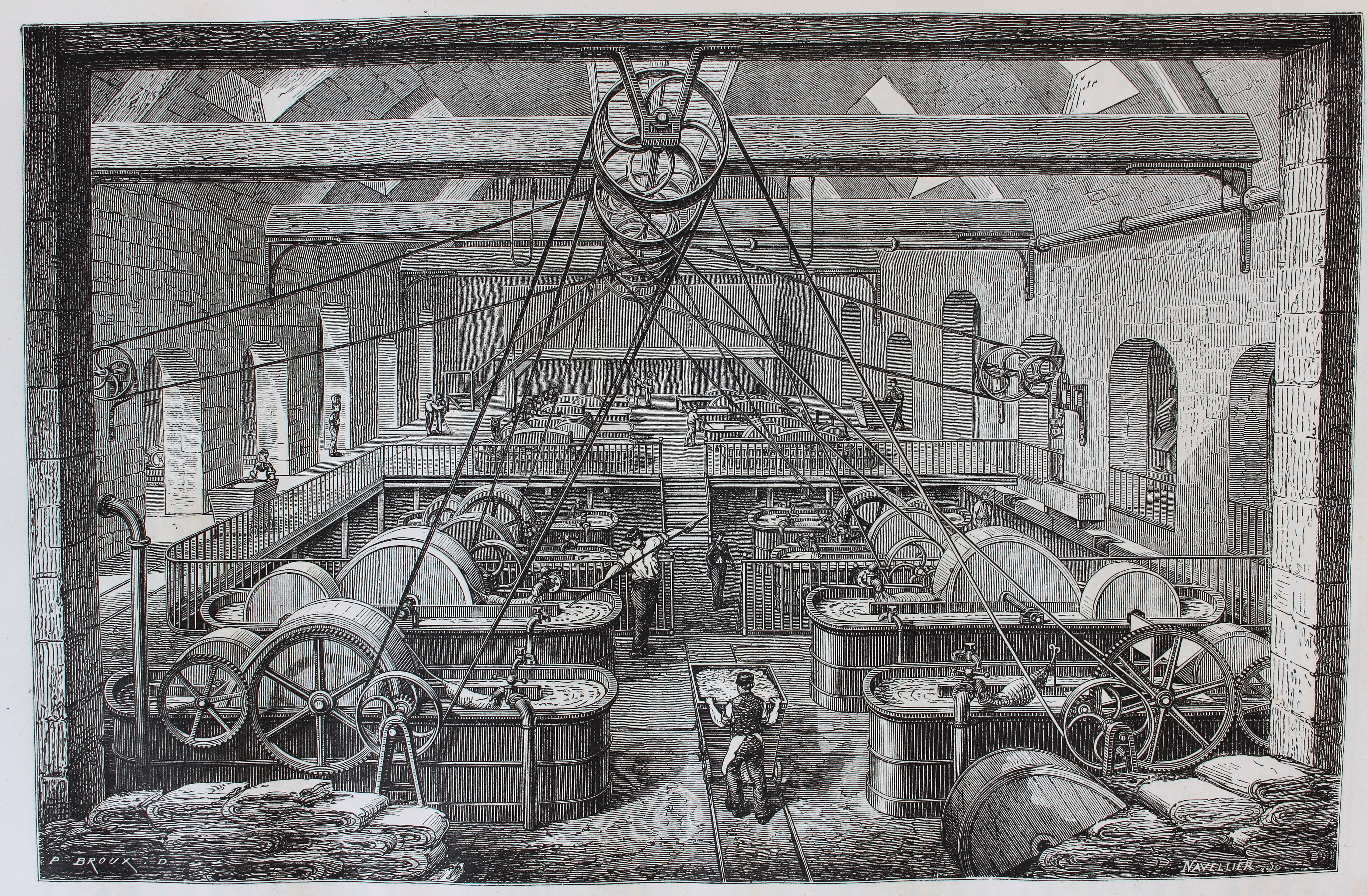 Ilustraciones de la obra : Les merveilles de l'industrie ou, Description des principales industries modernes / par Louis Figuier. - Paris : Furne, Jouvet, [1873-1877]. - Tome II